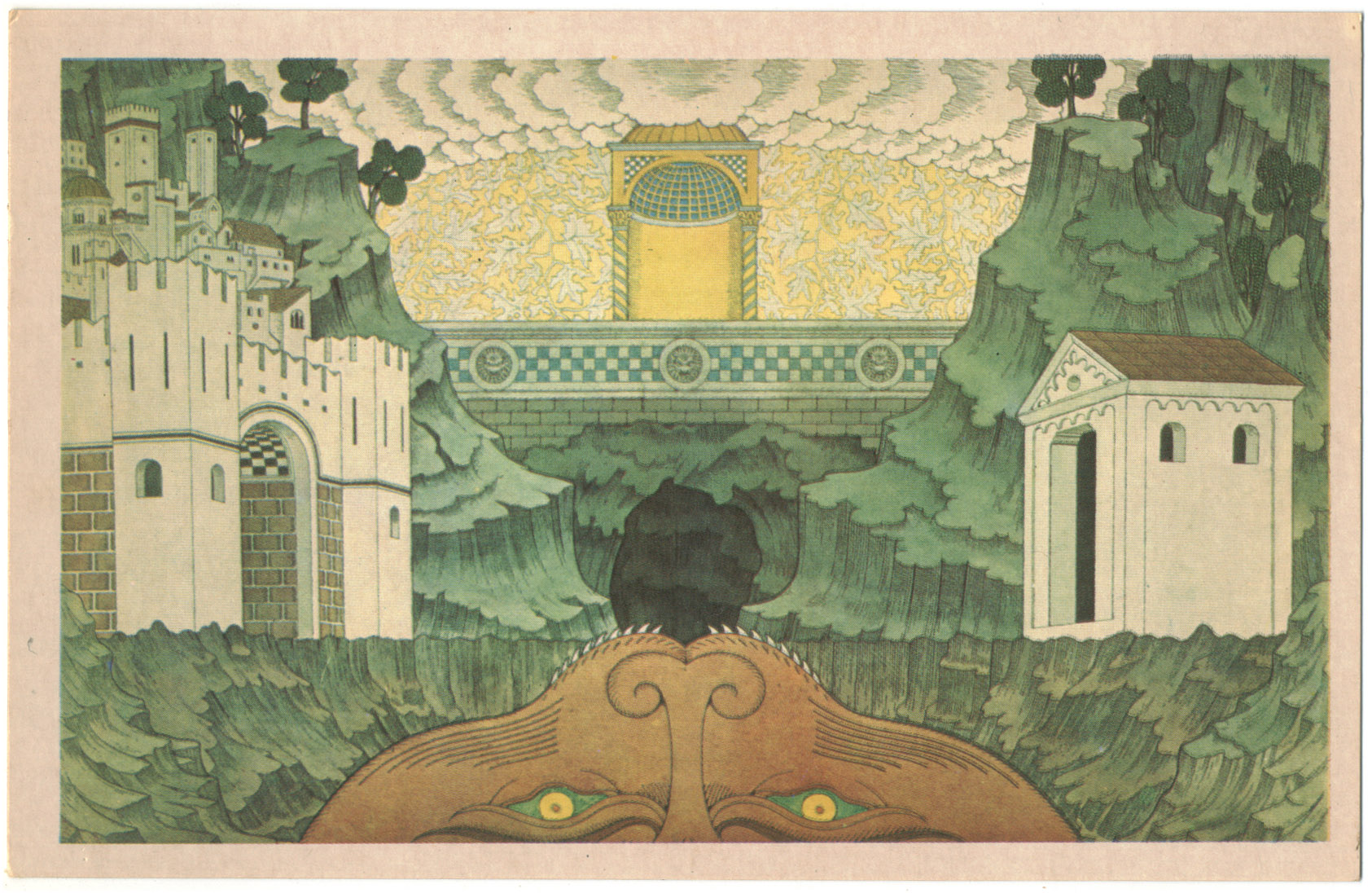 BILIBIN, Ivan (1907) . 'Le Miracle de Théophile' by Rutebeuf